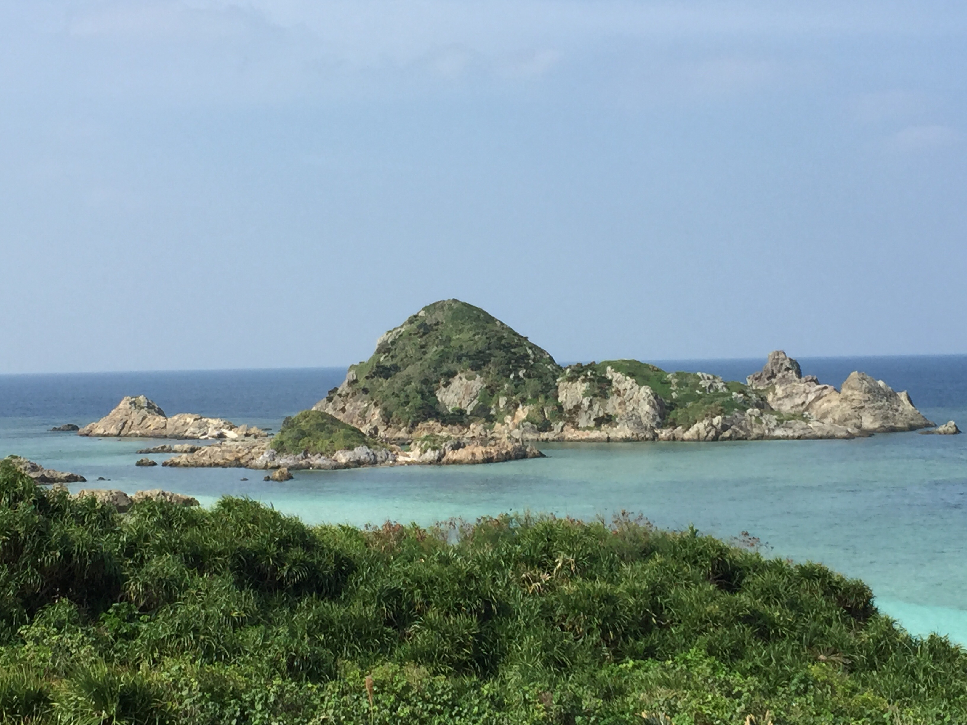 平離島を対岸の石垣島川平から見た所